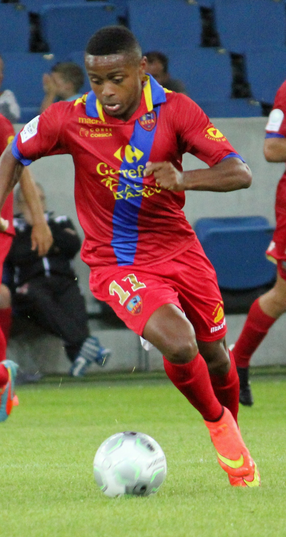 Ali M'Madi, footballeur comorien du Gazélec Ajaccio lors de la saison 2014-2015.